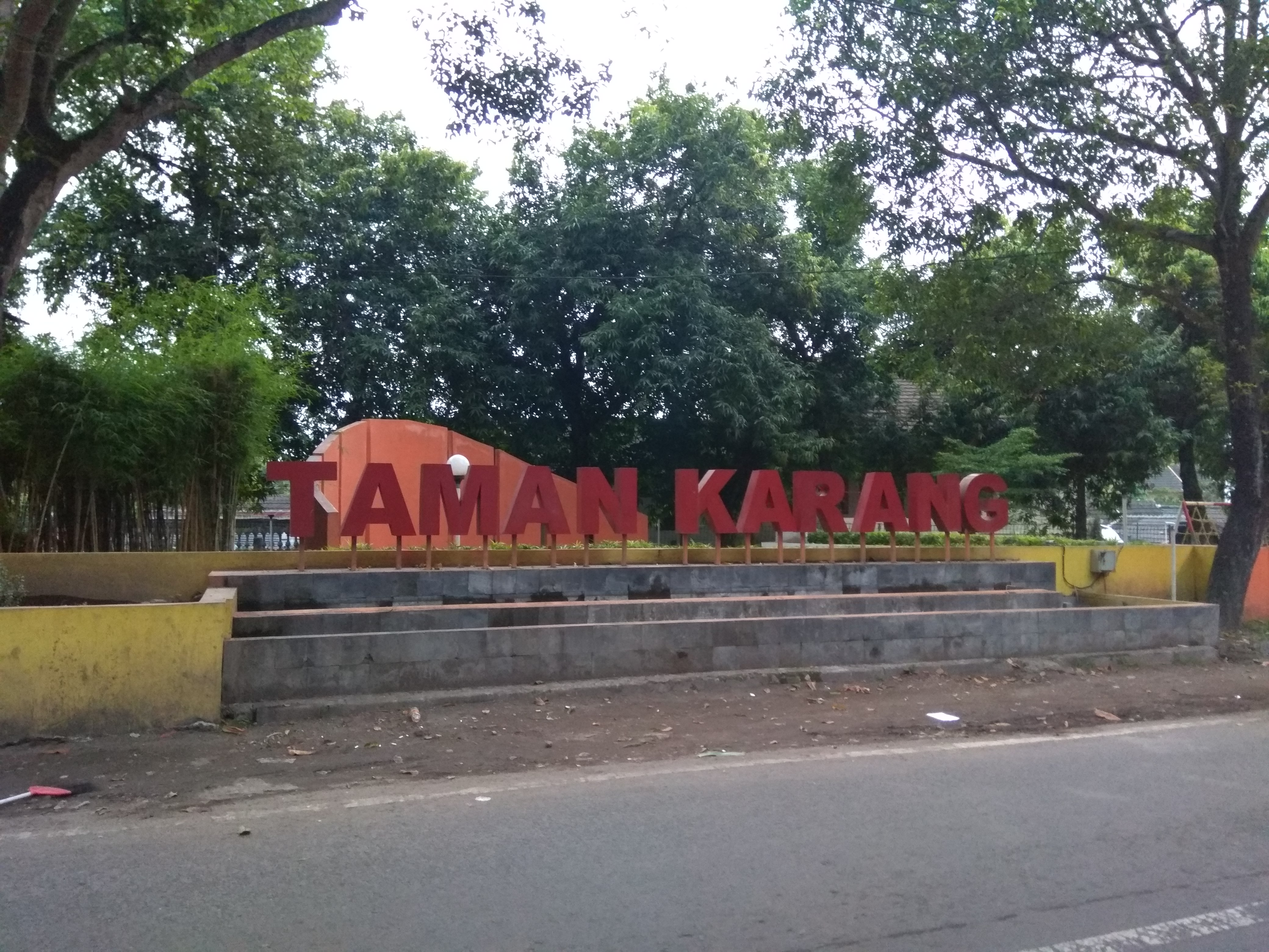 Tampak depan Taman Karang